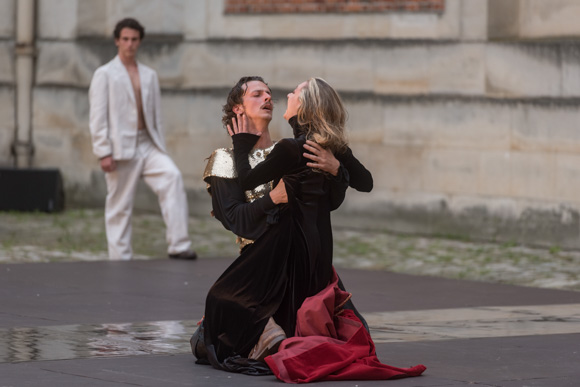 Mois Molière 2018 (Grande Ecurie) Crédit photo : Ville de Versailles / Marc O Carion